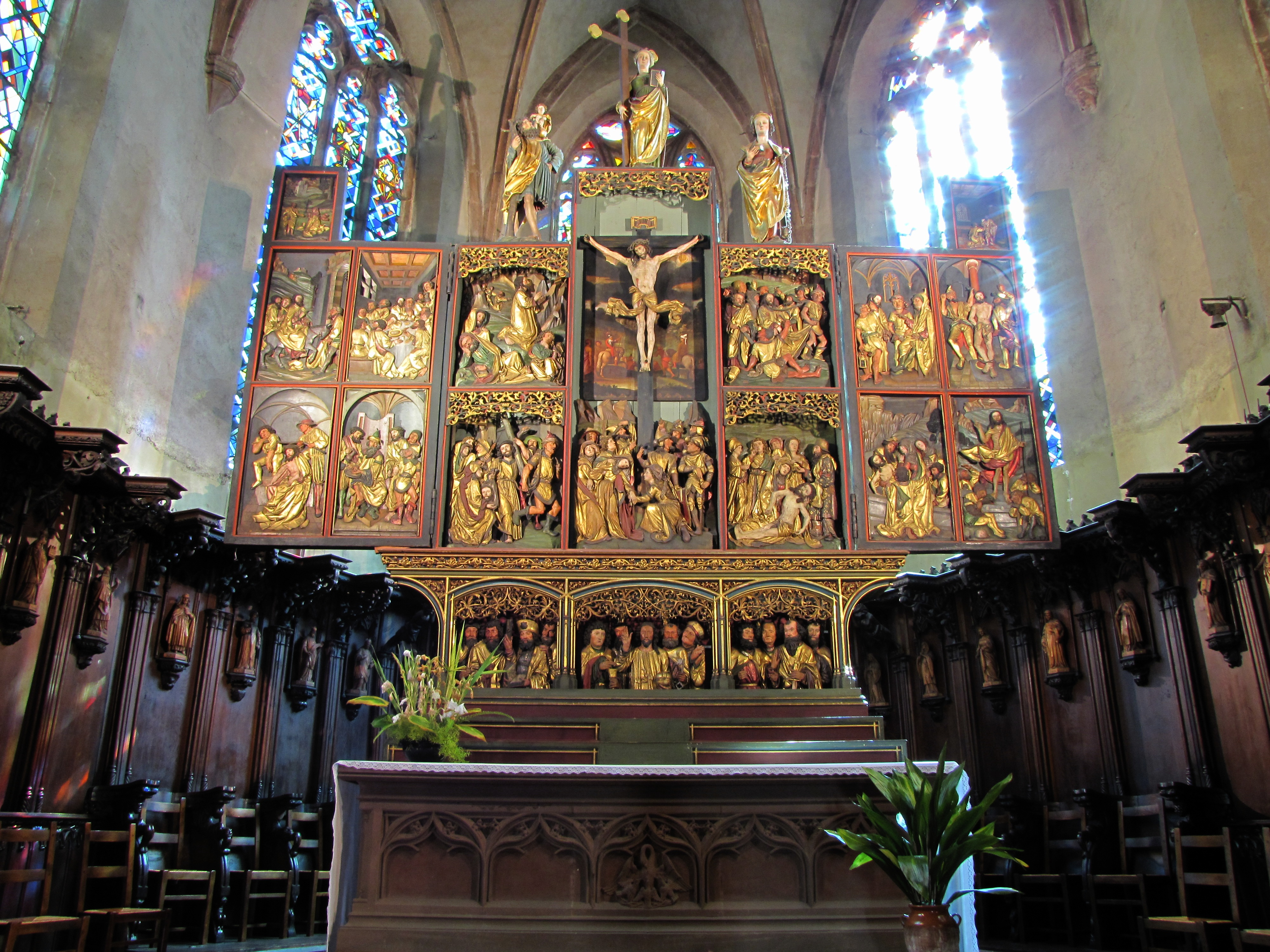 Alsace, Haut-Rhin, Église Sainte-Croix (XIIIe-XVe-XVIe) de Kaysersberg (PA00085477, IA68000563) Lambris, statues de saints et stalles (XIXe): This object is classé Monument Historique in the base Palissy, database of the French furniture patrimony of the French ministry of culture, under the references PM68000162, IM68006813 and IM68006845. Retable de la Passion (XVIe): This object is classé Monument Historique in the base Palissy, database of the French furniture patrimony of the French ministry of culture, under the references PM68000136, IM68006816 and IM68006817.